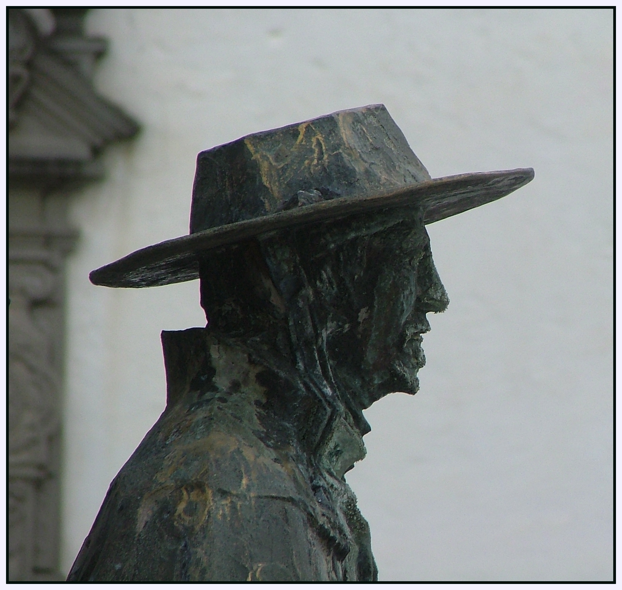 Bronze-Kopf der Brunnen-Figur von Kardinal Otto von Waldburg, Bischof von Augsburg 1543–1573, im Innenhof von Schloss Zeil